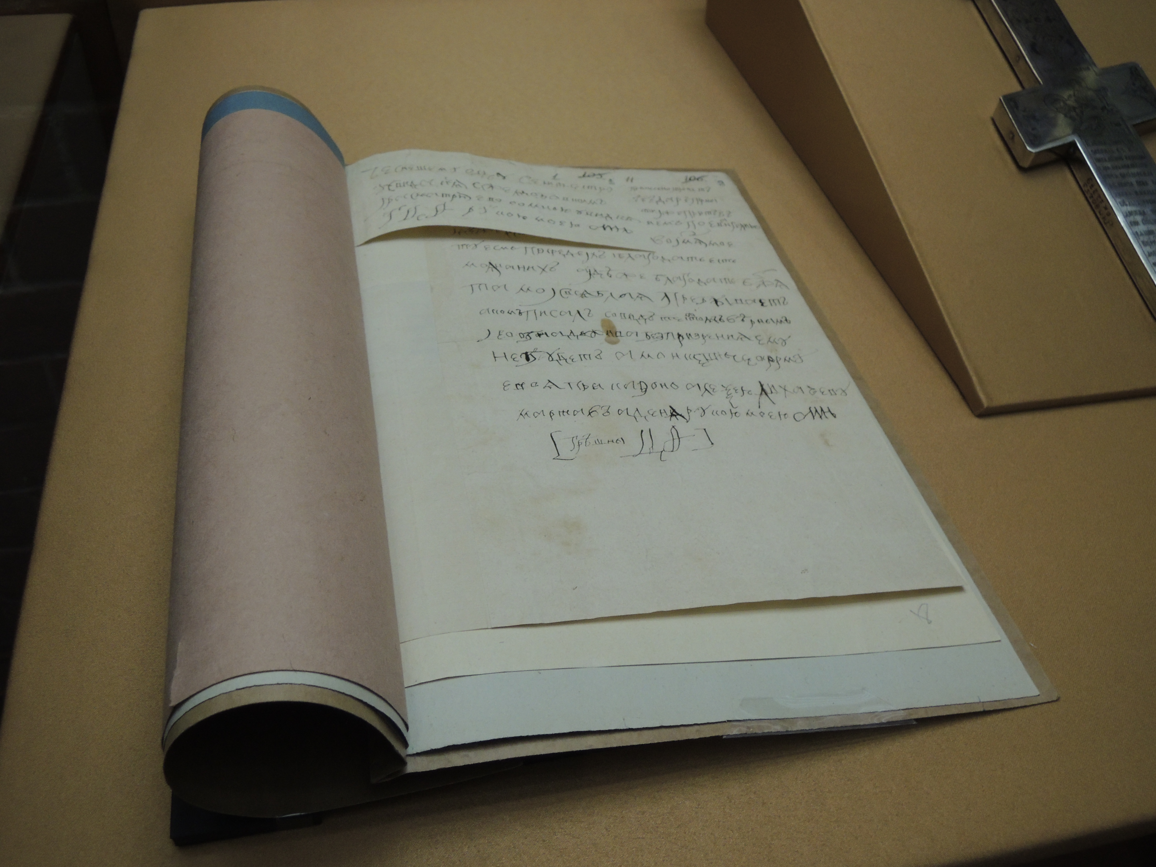 1682, 1 марта. Письмо царя Федора Алексеевича к чернецу Сильвестру медведеву о предстоящей свадьбе с Марфой Апраксиной. Автограф. РГАДА